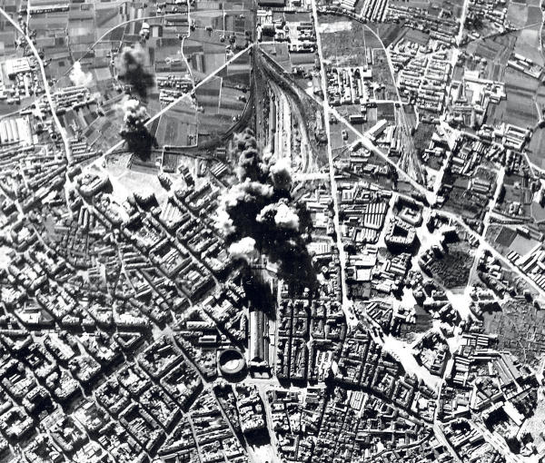 Bombardeo de la Aviación Legionaria italiana sobre la estación del Norte y el barrio de Ruzafa en Valencia, en 1937